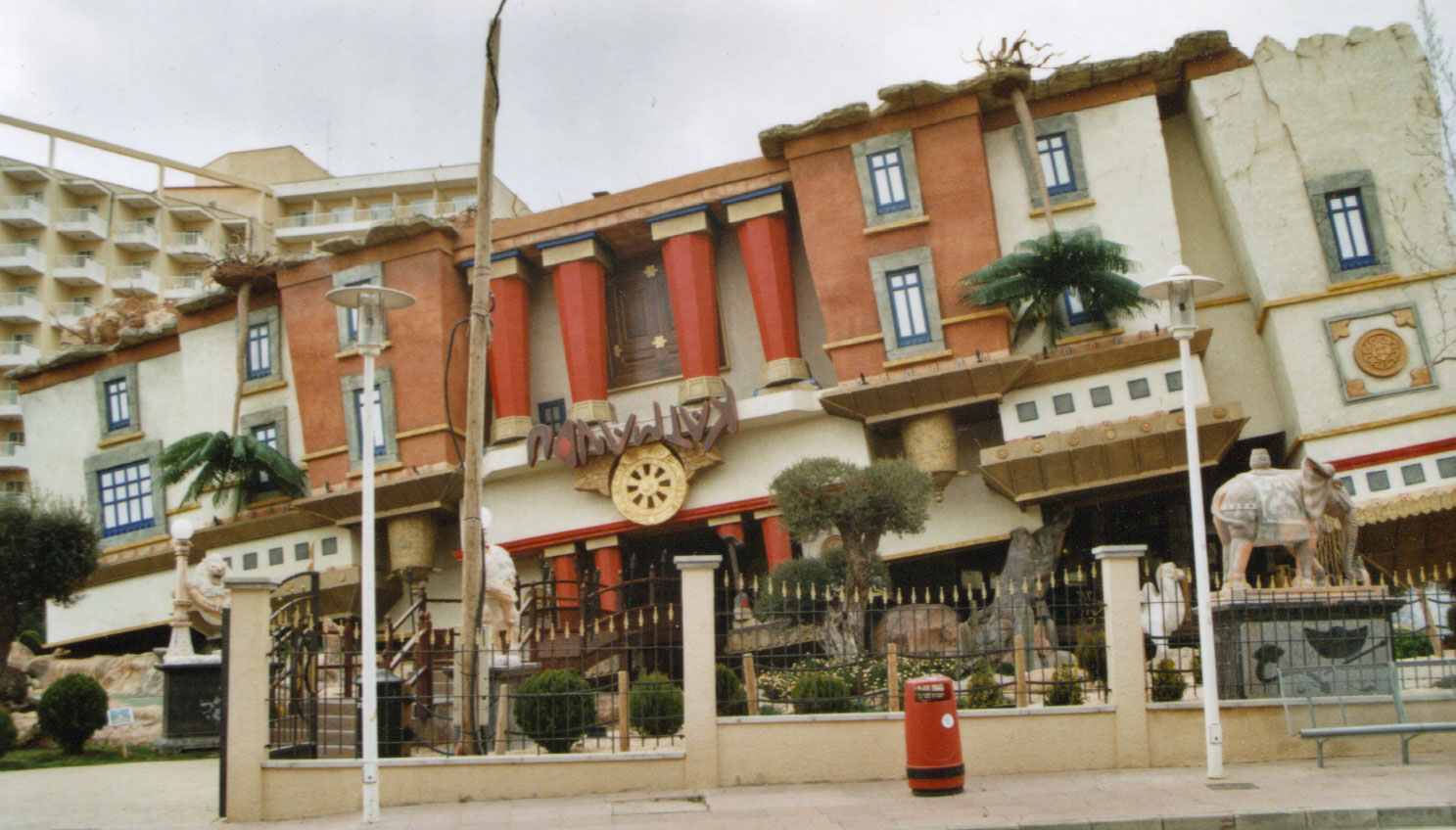 Mallorca Palma Nova Restaurant Katmandu